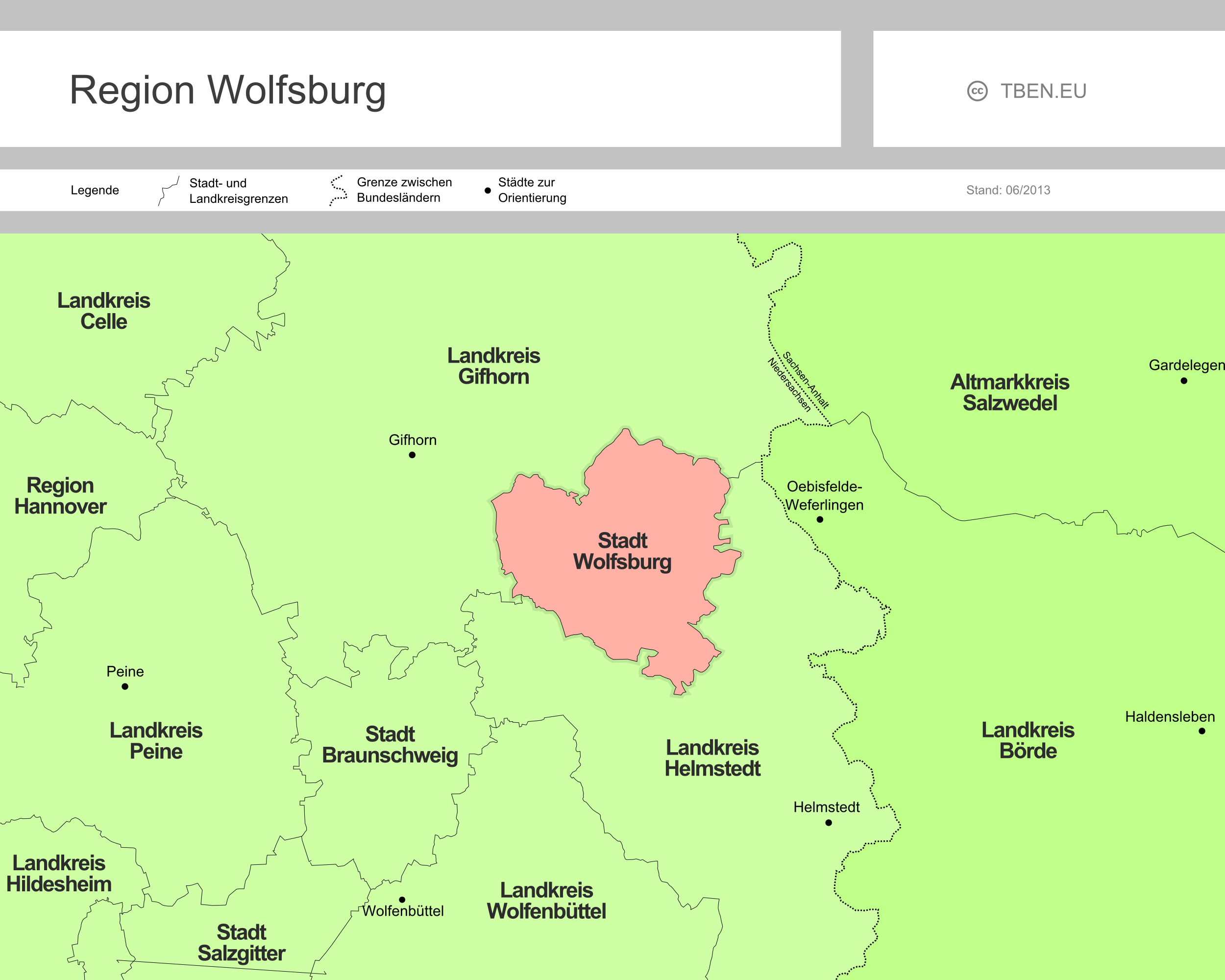 Regionskarte Wolfsburg